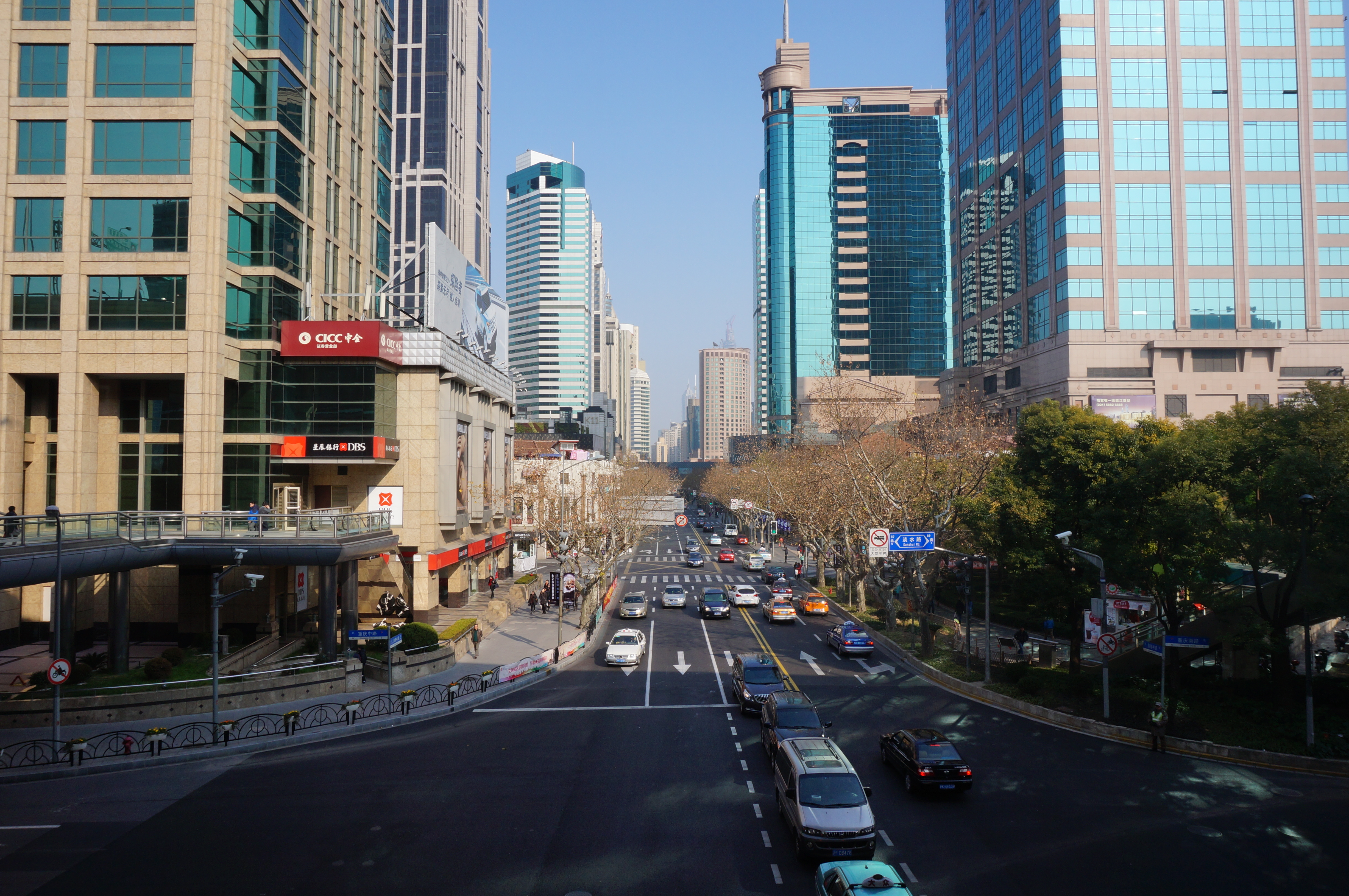 中文（中国大陆）: 淮海中路南北高架以东段